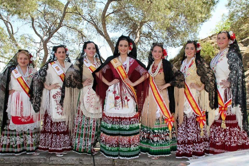 Reina y Damas 2015